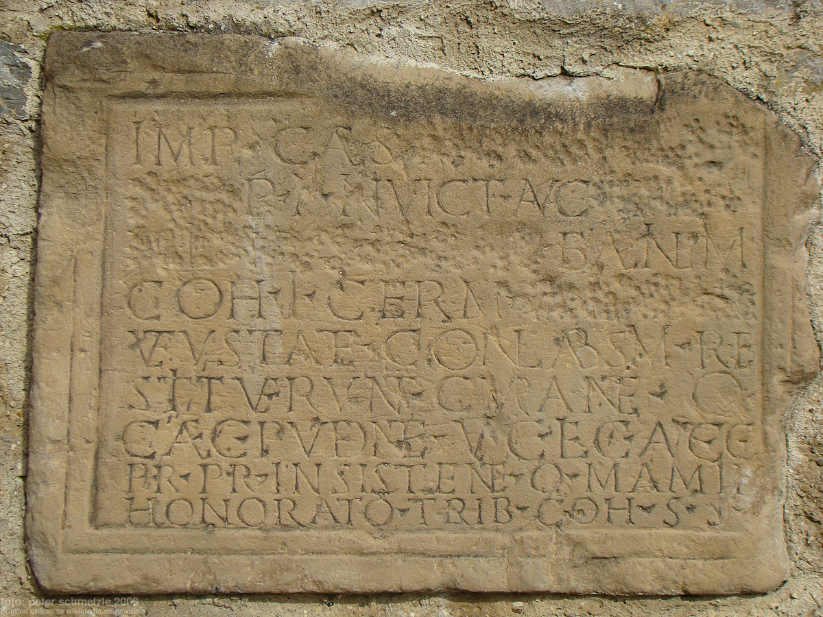 Bereits im 18. Jahrhundert im Jagsthausener kleinen Kastellbad auf der Flur Steinäcker aufgefundene Bauinschrift (CIL,13,6562) die zu den jüngsten Inschriften am „Vorderen Limes“ gehört und im Zeitraum 244 bis 247 n. Chr. entstanden ist. Die Inschrift nennt wie üblich auch die Namen der beiden damals regierenden Kaiser, Philippus I. und II. Ihre Namen wurden jedoch nachträglich aus der Inschrift entfernt, da sie der Damnatio memoriae anheim fielen. Kopie im Römerbad Jagsthausen.